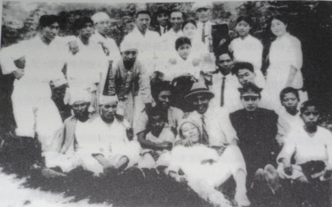 阿里郎剧组抱孩子的是罗云奎旁边带礼帽的是摄影师加藤恭平